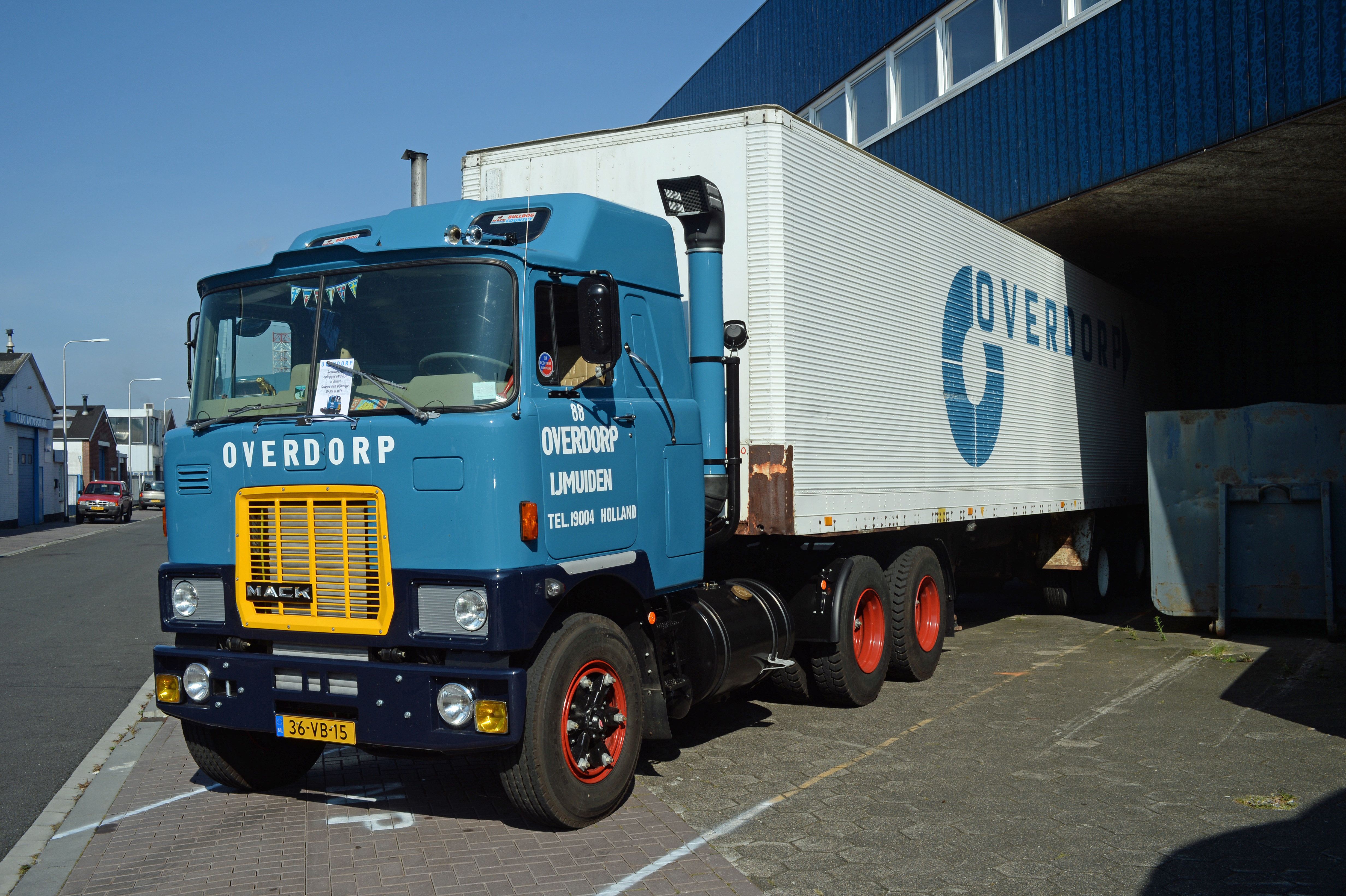 1980 Mack F 786 ST Overdorp IJmuiden T88 Trailer Overdorp opl 059